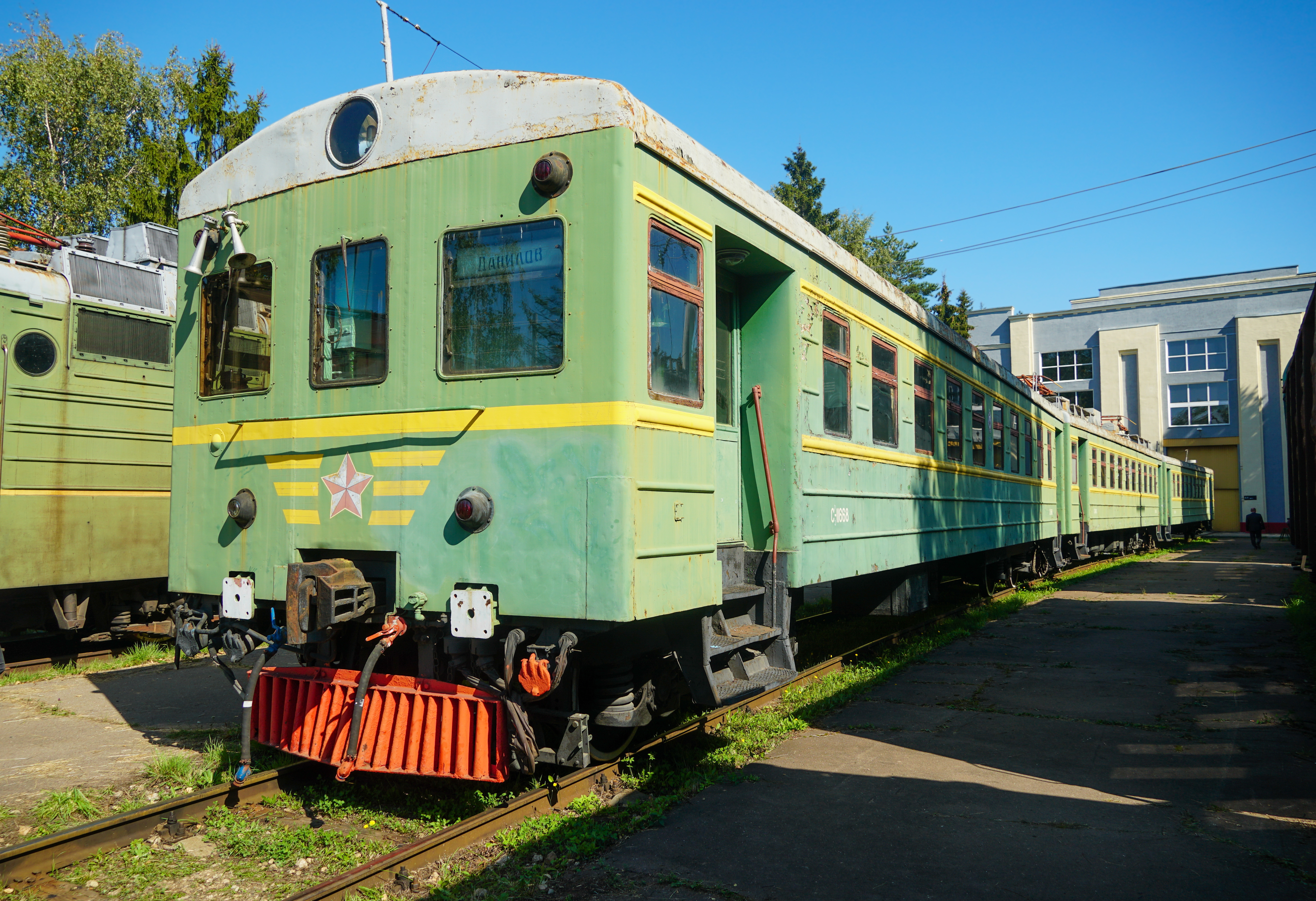 Электропоезд Ср3-1668 на территории депо кольца ВНИИЖТ в Щербинке на выставке Экспо-1520 2019 года